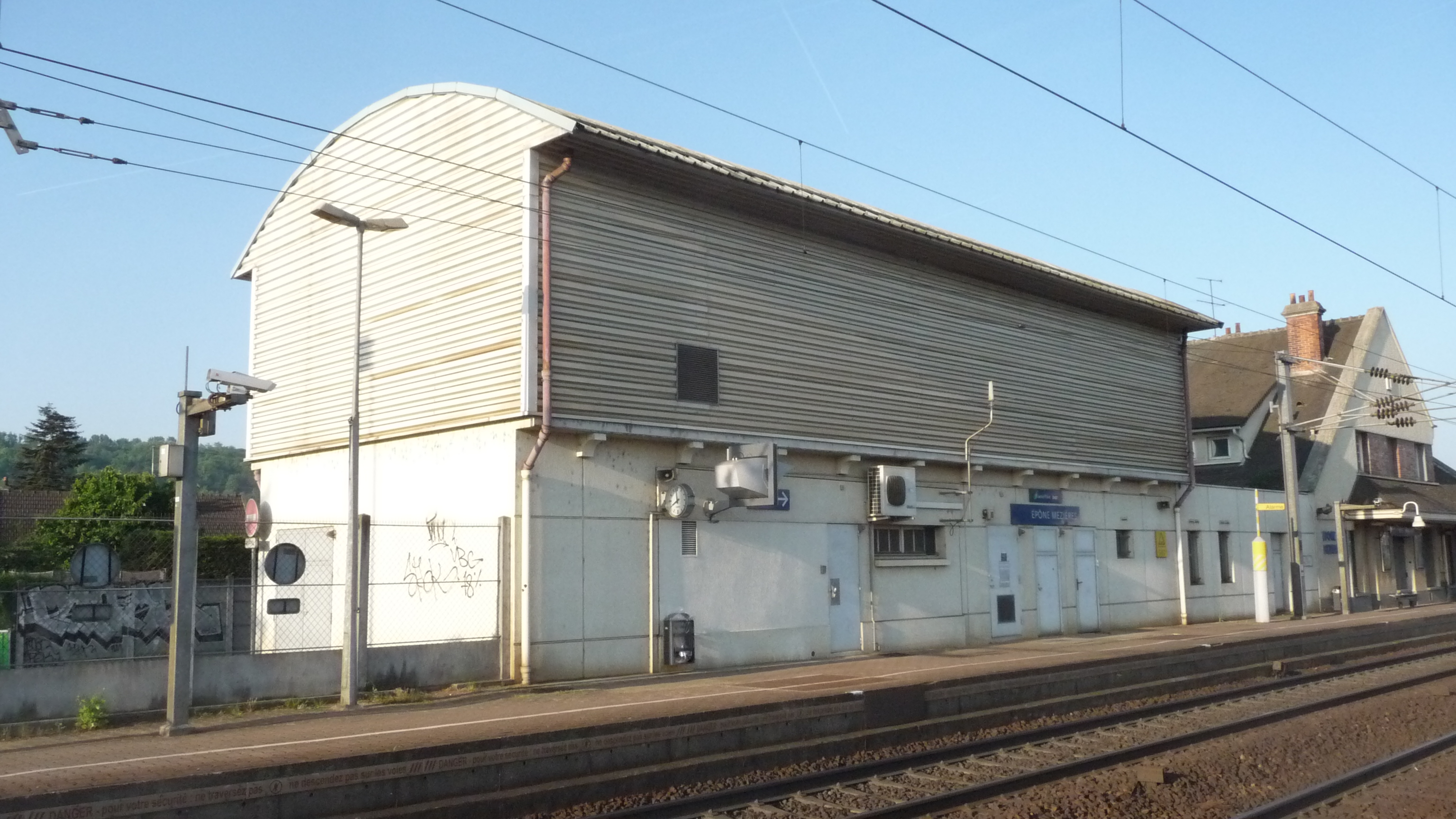 Bâtiment technique de la gare d'Épône-Mézières (Yvelines - France).